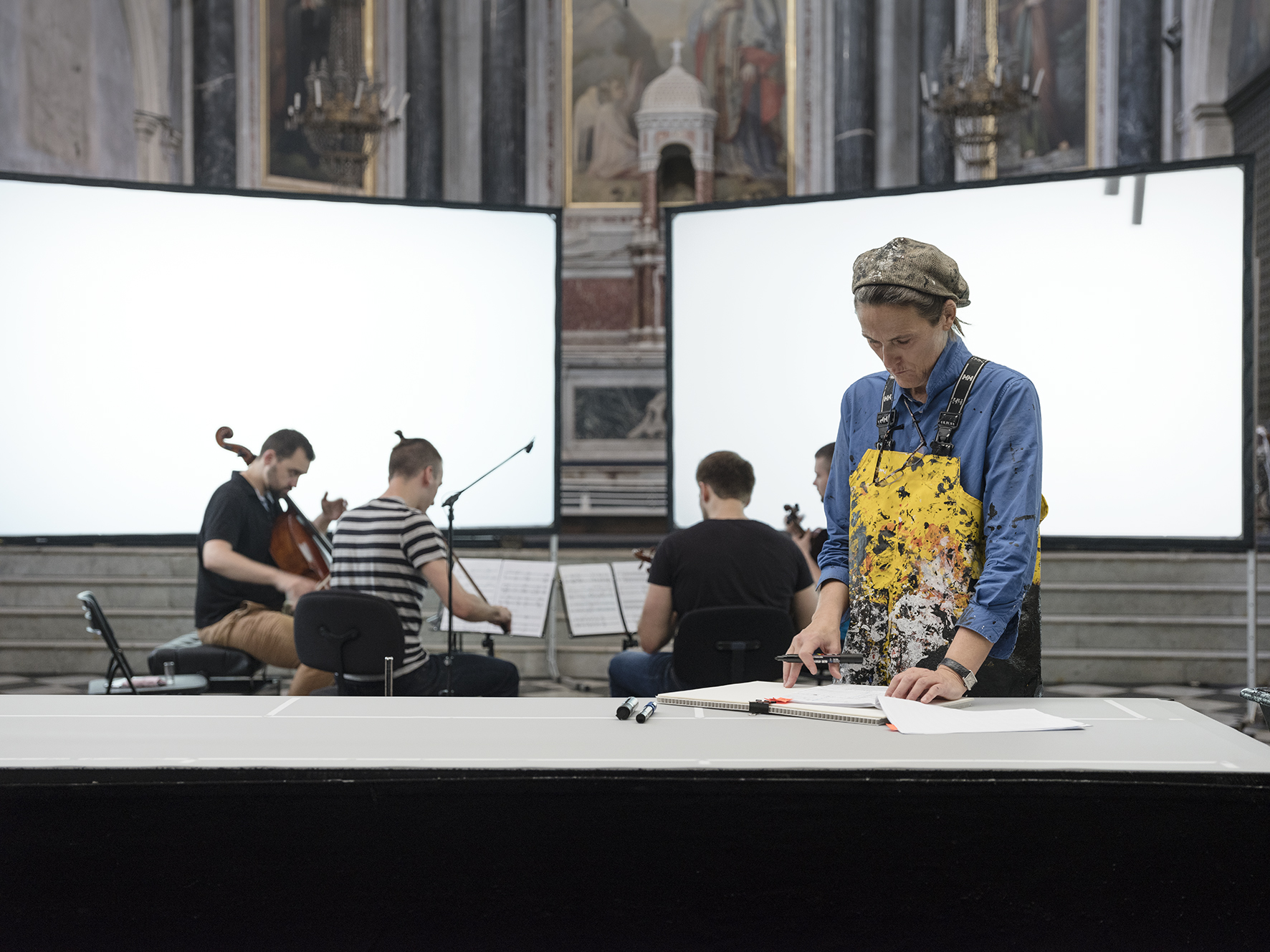 Fabienne Verdier, répétition du projet « Sound Traces ».